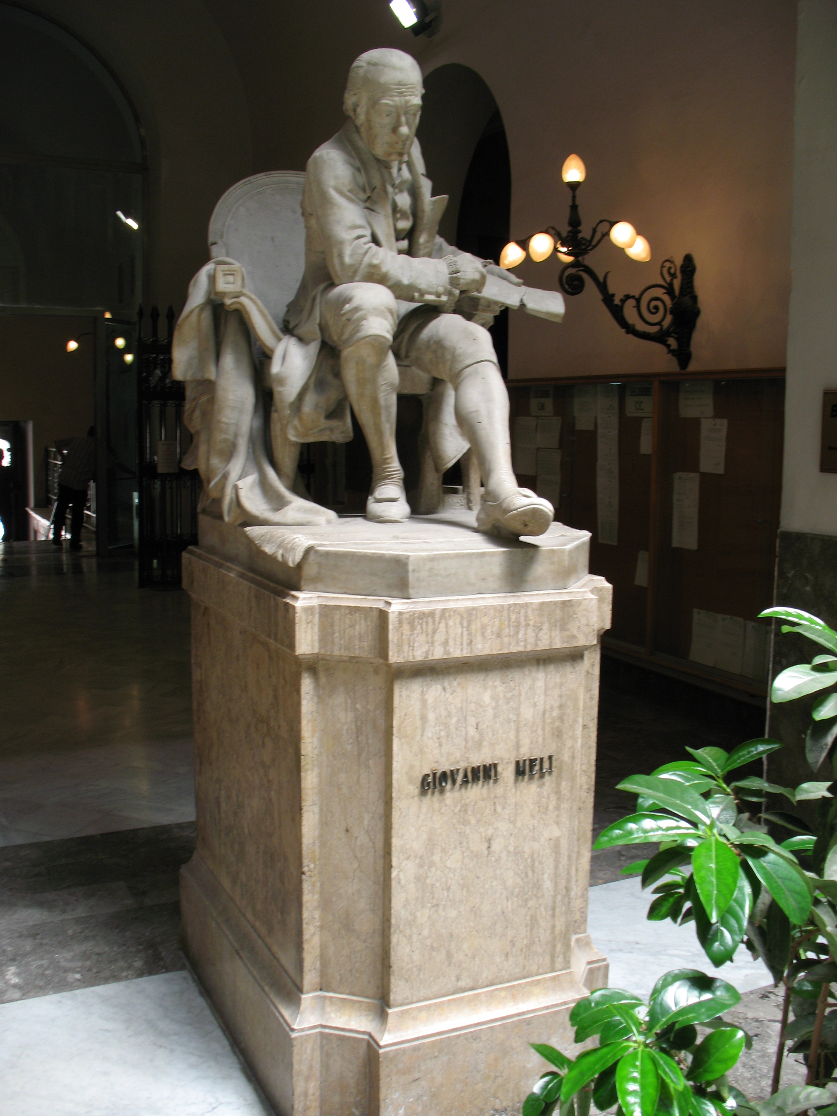 Palazzo Pretorio di Palermo, monumento a Giovanni Meli